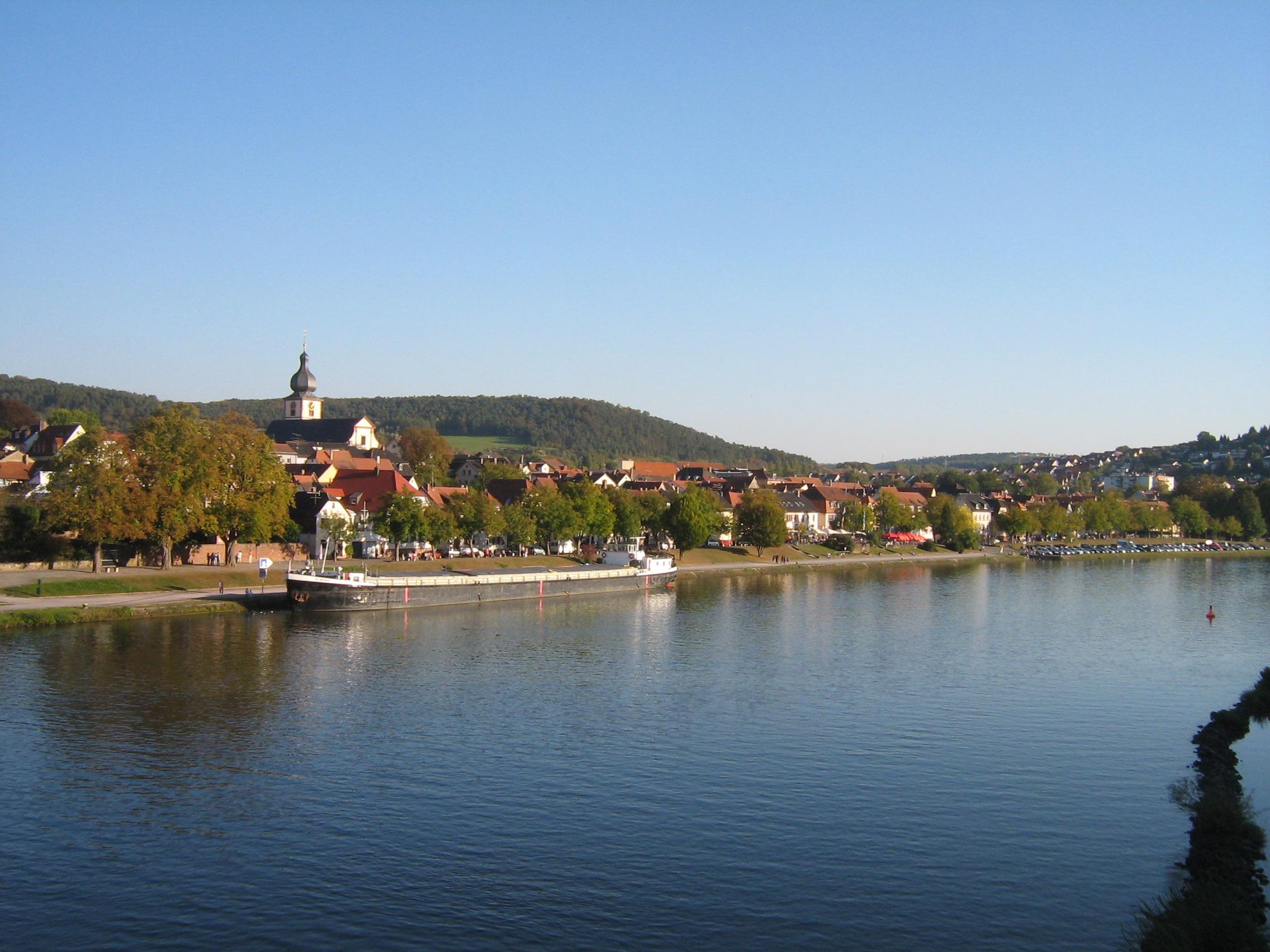 Marktheidenfeld (Blick von der alten Mainbrücke)